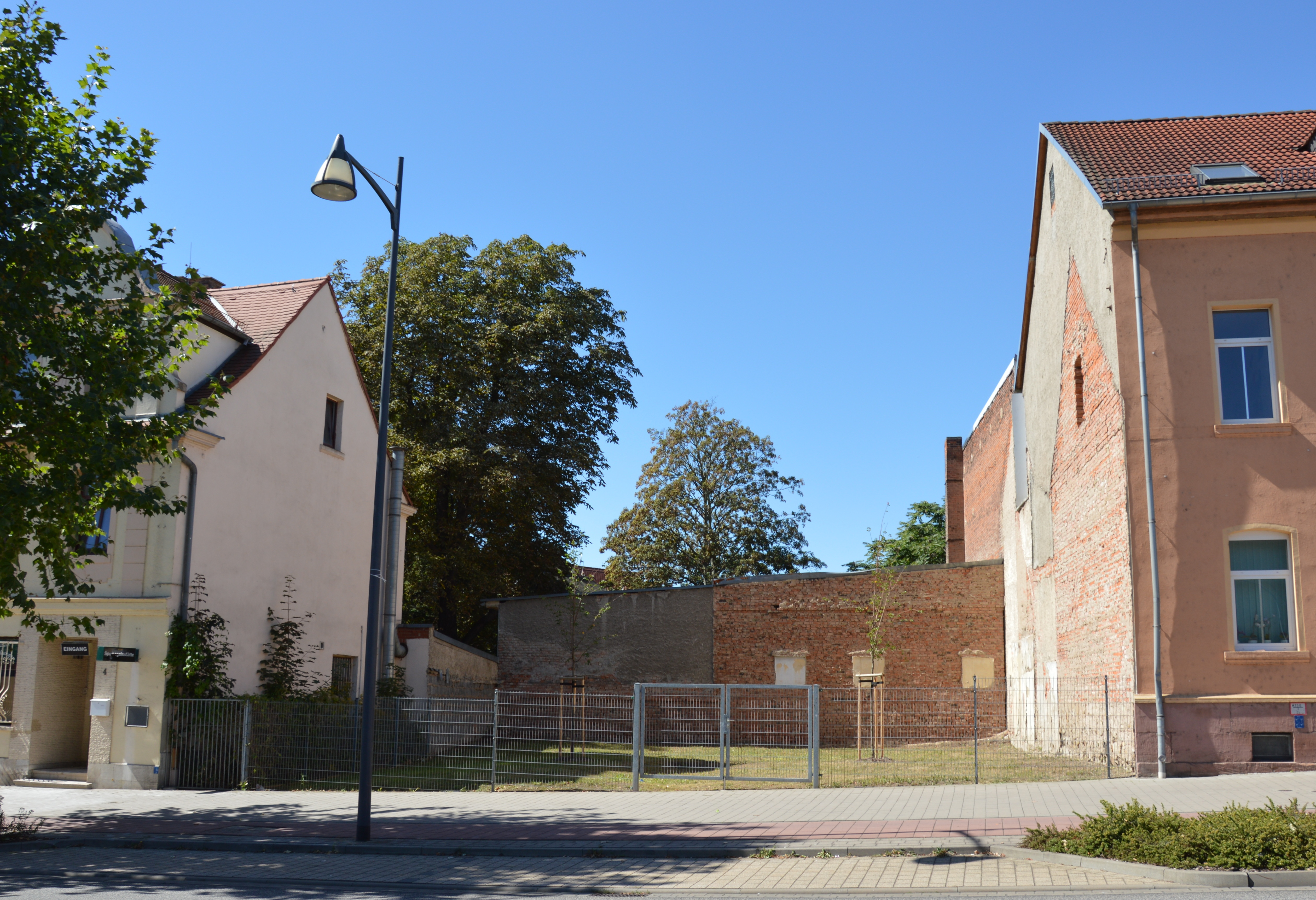 Grundstück des ehemaligen Kulturdenkmals Merseburger Straße 6 in Weißenfels